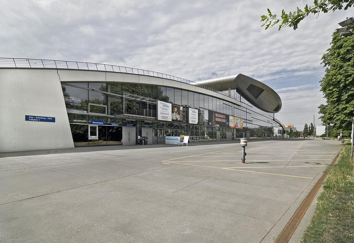 Zu sehen sind links:Brandmeldezentrale, Konzertkasse und Gästelistencounter und rechts der Haupteingang bzw. Eingänge sowie die Eingänge zu den Sporthallen.